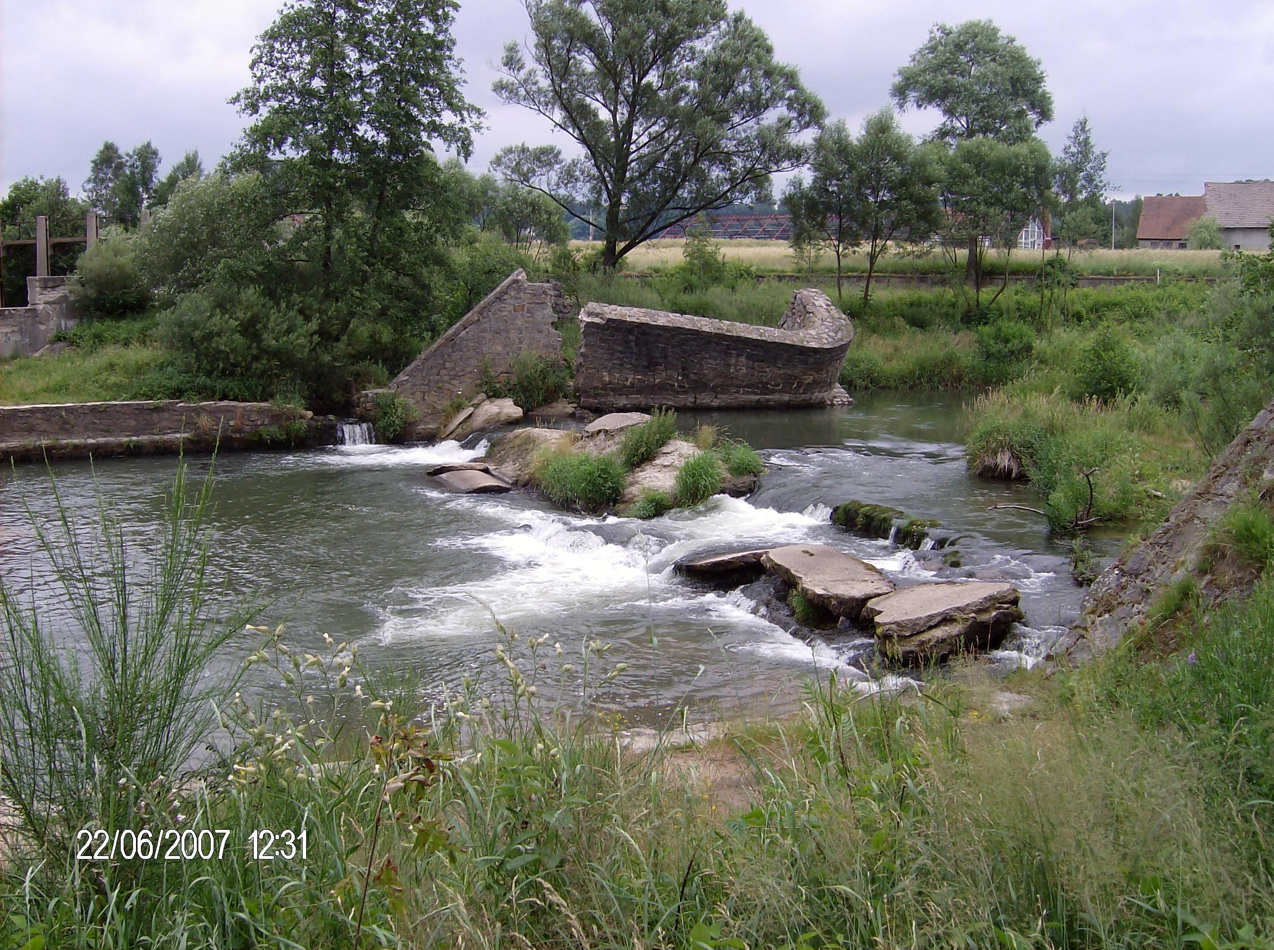 Rzeka Kwisa